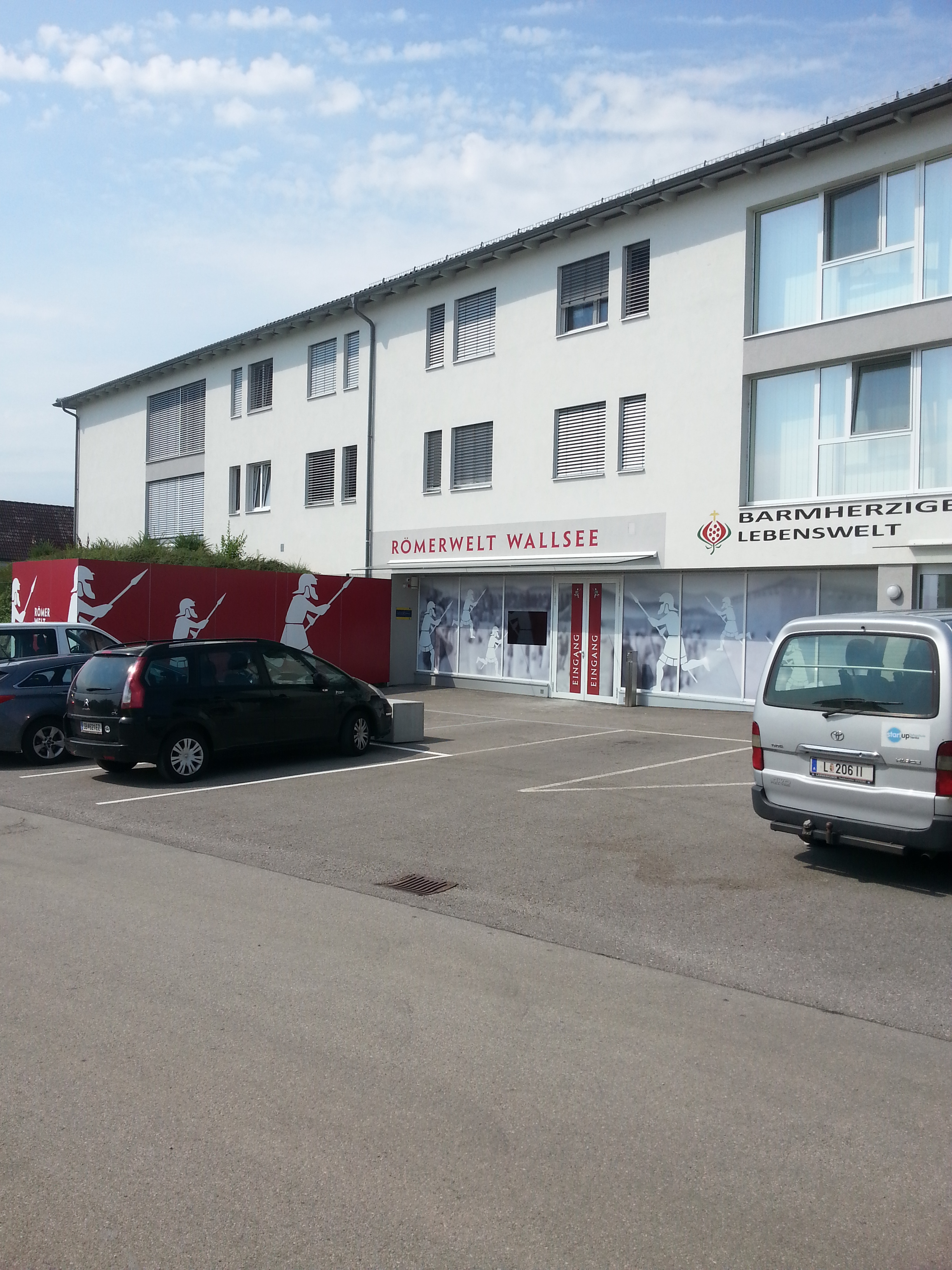 Gebäude der Römerwelt Wallsee, im Erdgeschoß befinden sich die Mauerreste eines spätantiken Restkastells.